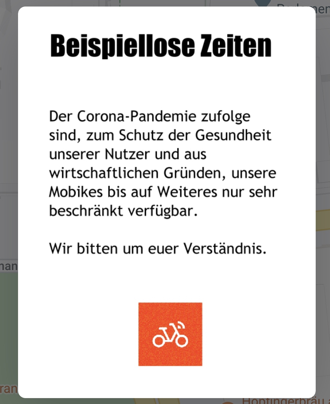 Eine Information von Mobike über die deutsche Mobike-App